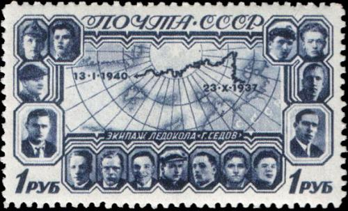 Почтовая марка СССР - 15 человек экипажа ледокола "Георгий Седов", Герои Советского Союза